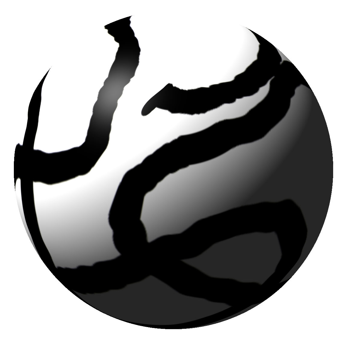 zeigt 3-d effekt